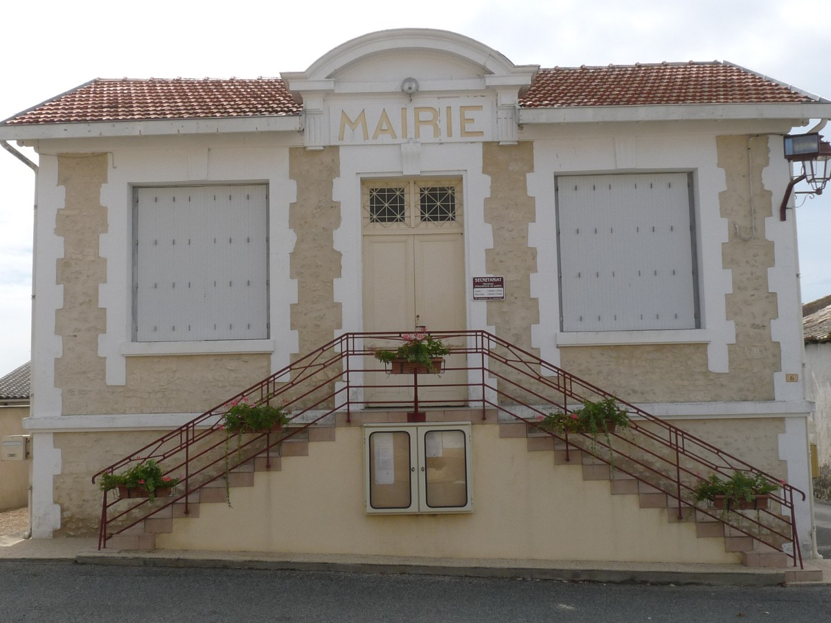 Mairie de Semoussac, Charente-Maritime, France